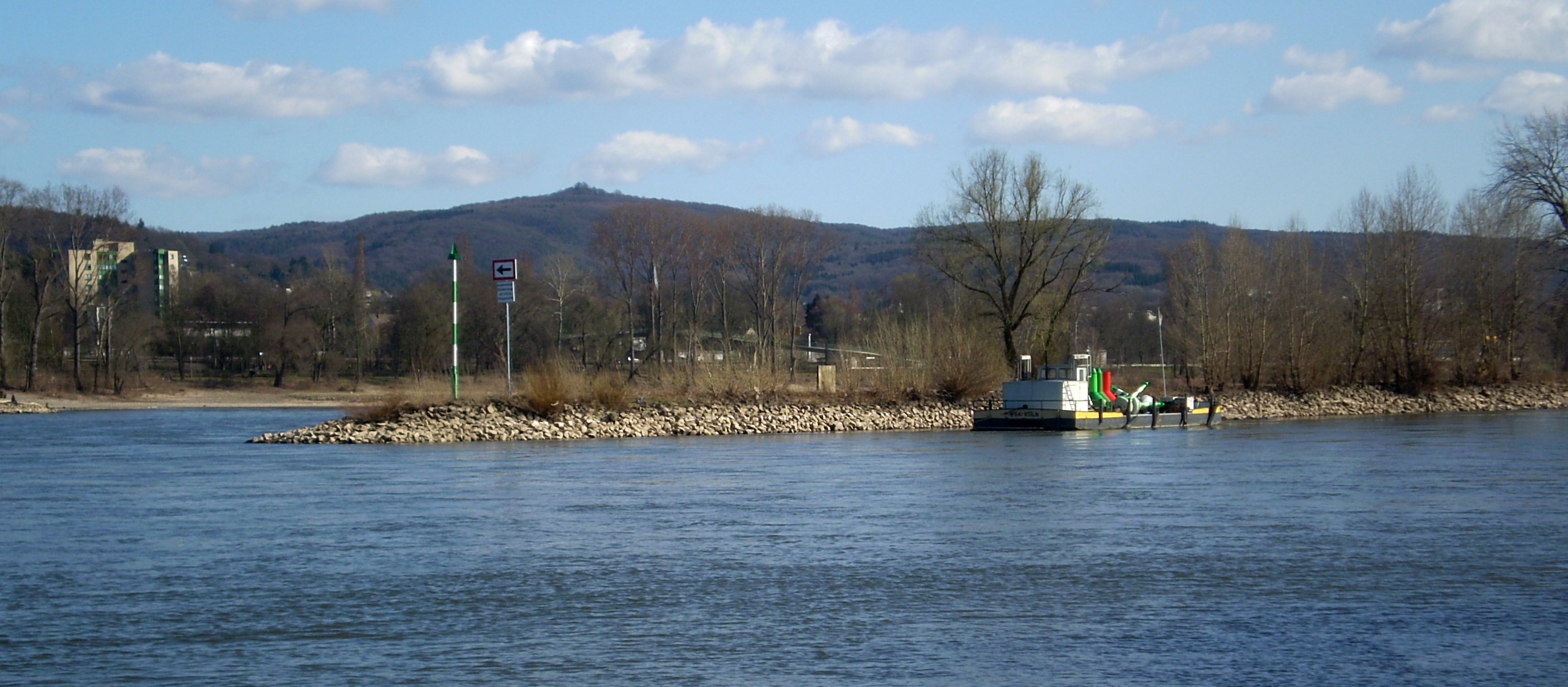 Nordspitze der Insel Nonnenwerth, Bonn-Mehlem; im Hintergrund Bad Honnef und Siebengebirge